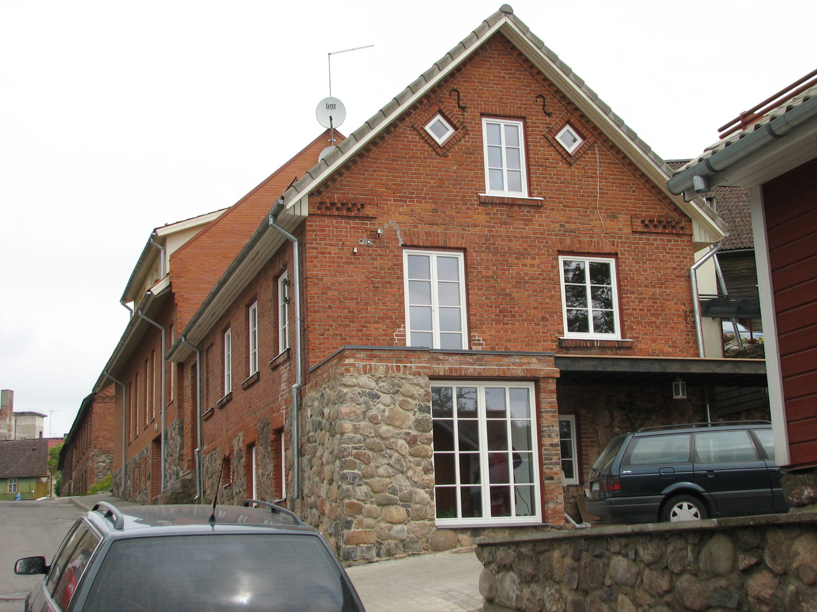 typische Architektur in Viljandi: rote Ziegelsteinhäuser mit zwei rautenförmigen Fernster im Dachgeschoss an der Giebelwand.